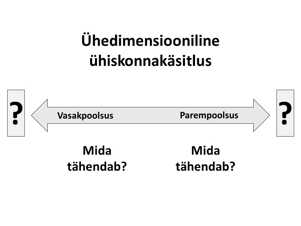 Ühe-dimensiooniline ühiskonnakäsitlus